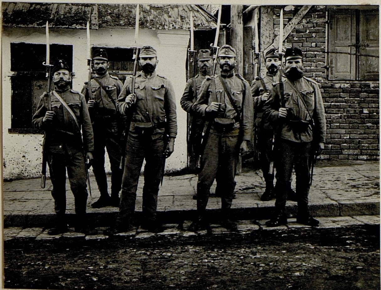 Typen der ersten Karpathen Verteidiger.